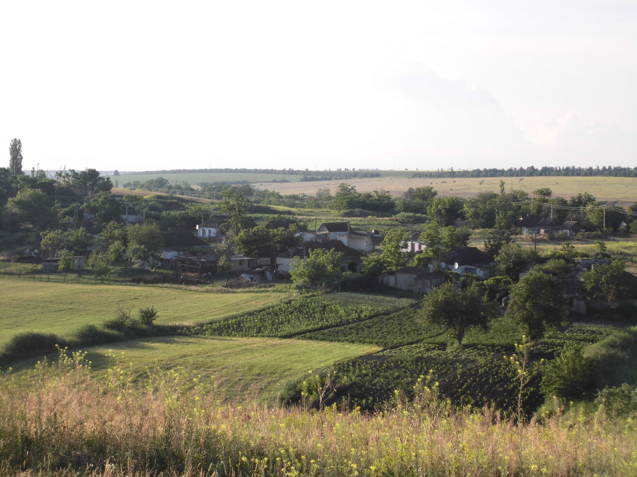 Південна частина села!